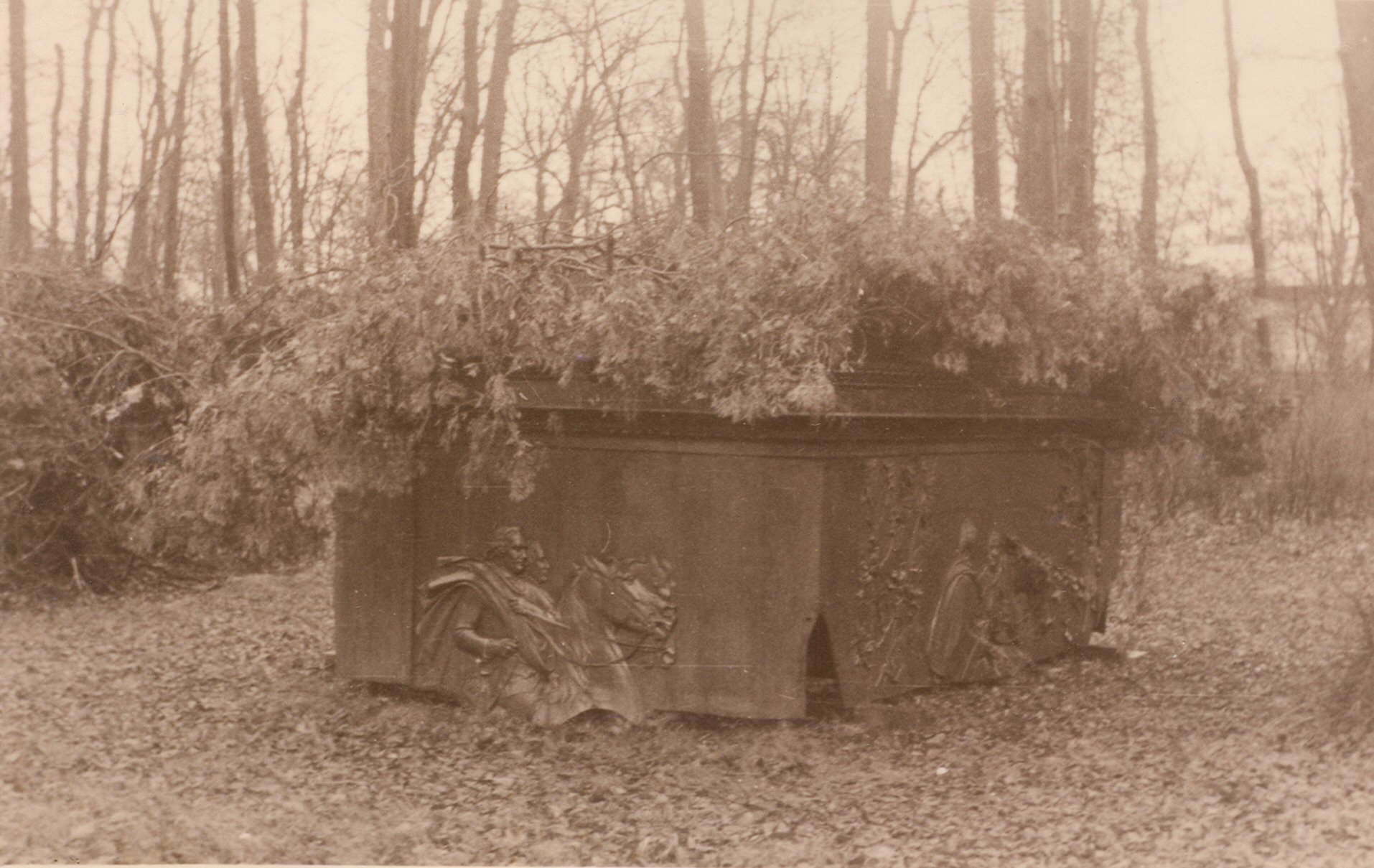 Ein Teil des Sockels bei der Zwischenlagerung in Potsdam